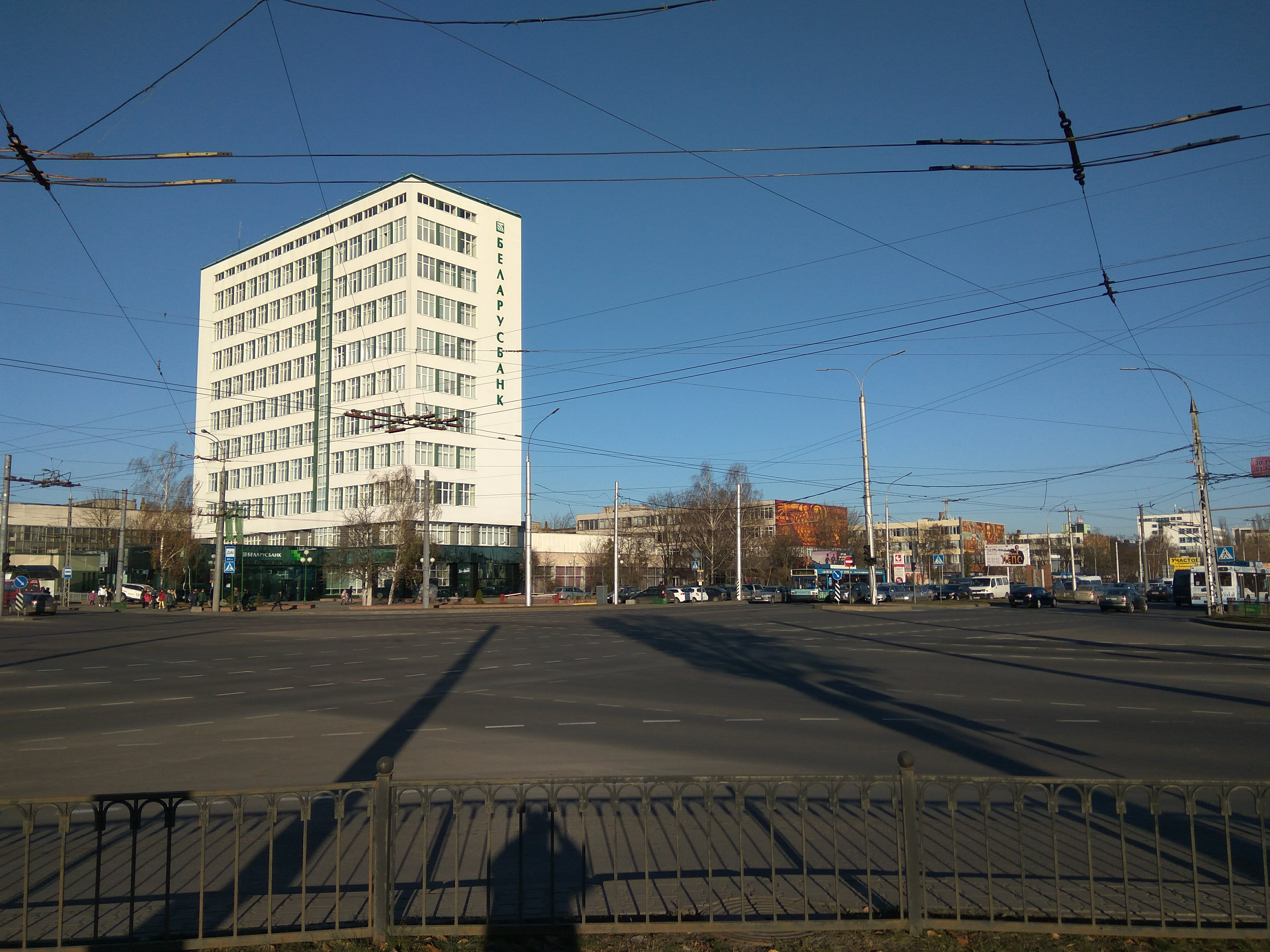 Брэст. Маскоўская вуліца - Піянерская вуліца